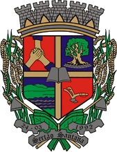 Brasão do Município de Sertão Santana, Rio Grande do Sul, Brazil.